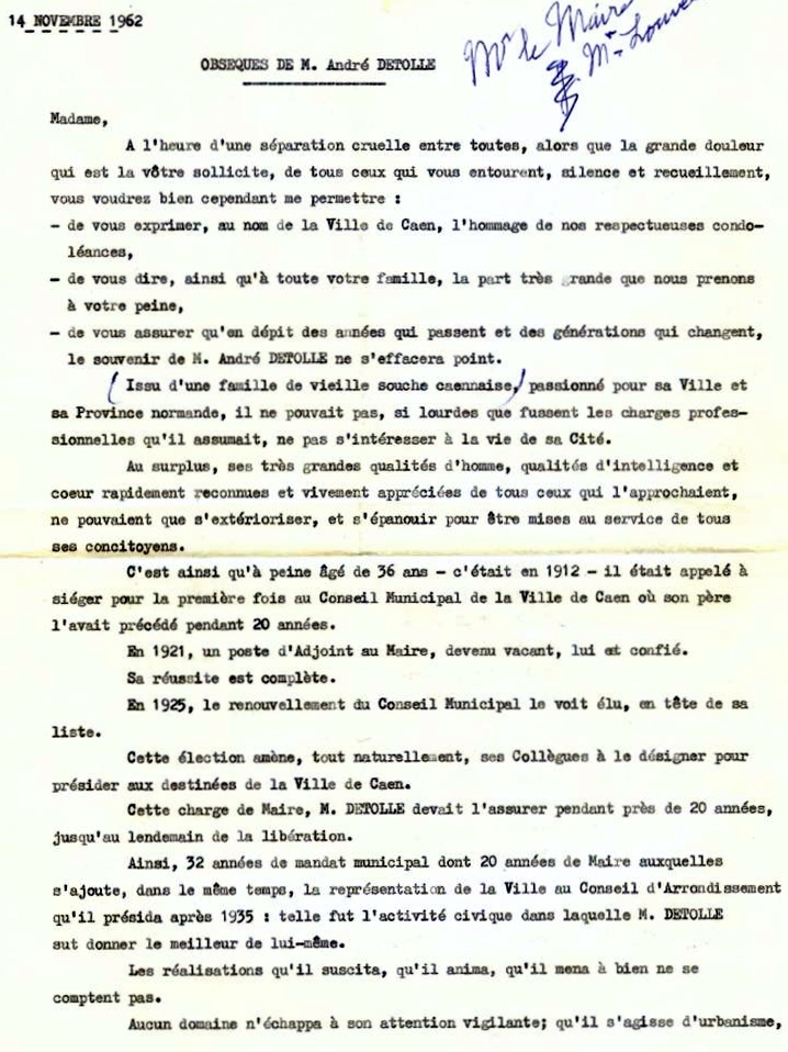 novembre 1962 : Hommage rendu à André par la ville de Caen, allocution de Jean-Marie Louvel (début).